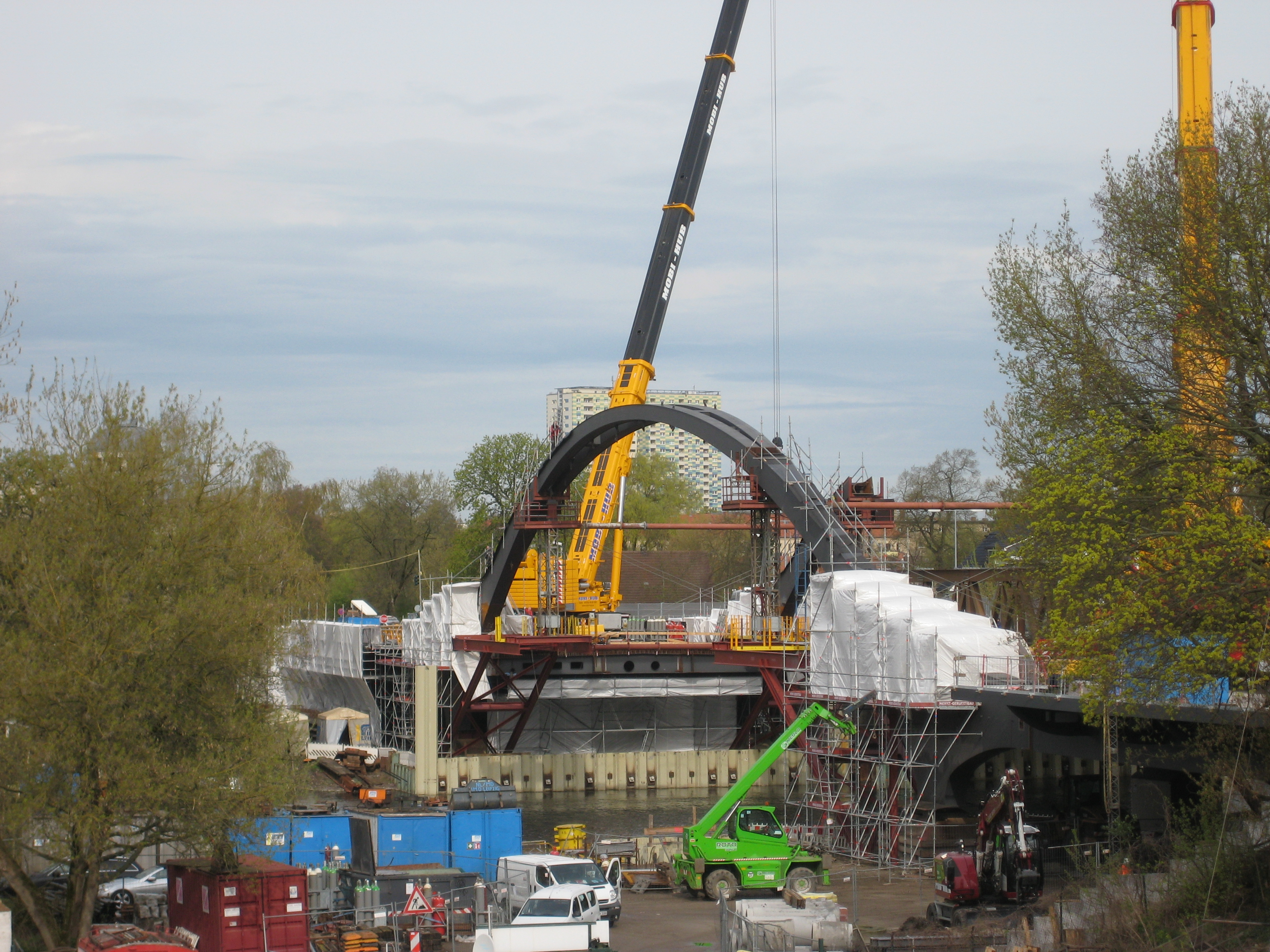 Neue Freybrücke Montage 16-04-2016, südlicher Bogen vor Montage des nördlichen